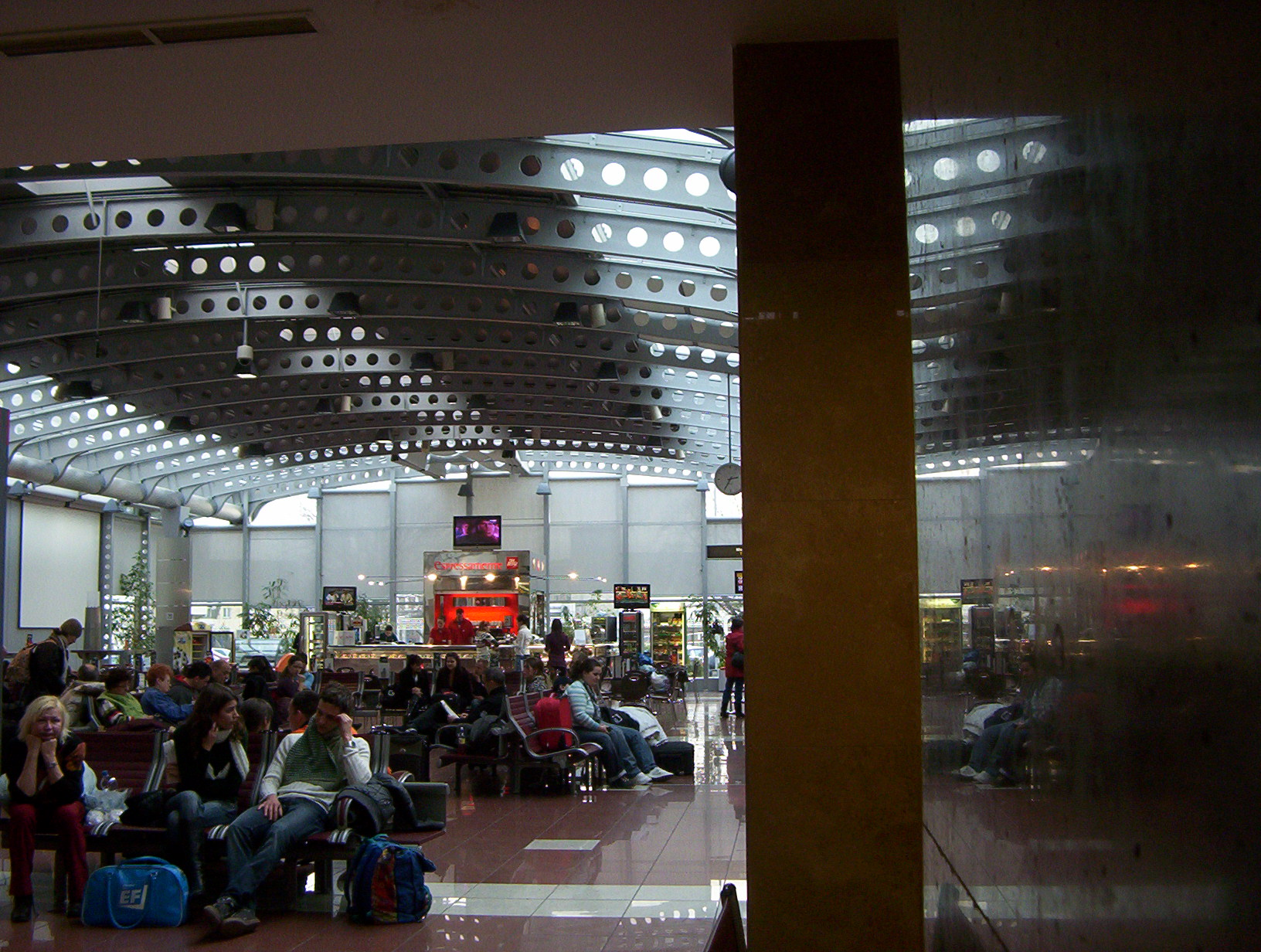 A Liszt Ferenc Repülőtér 1-es termináljának várócsarnoka, az ülőhelyek